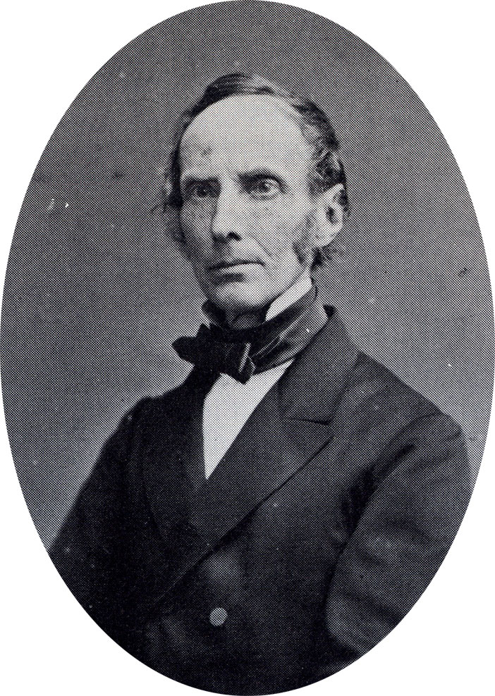 Portret van Marius Anthonius Gijsbertus Vorstman (1805-1894)